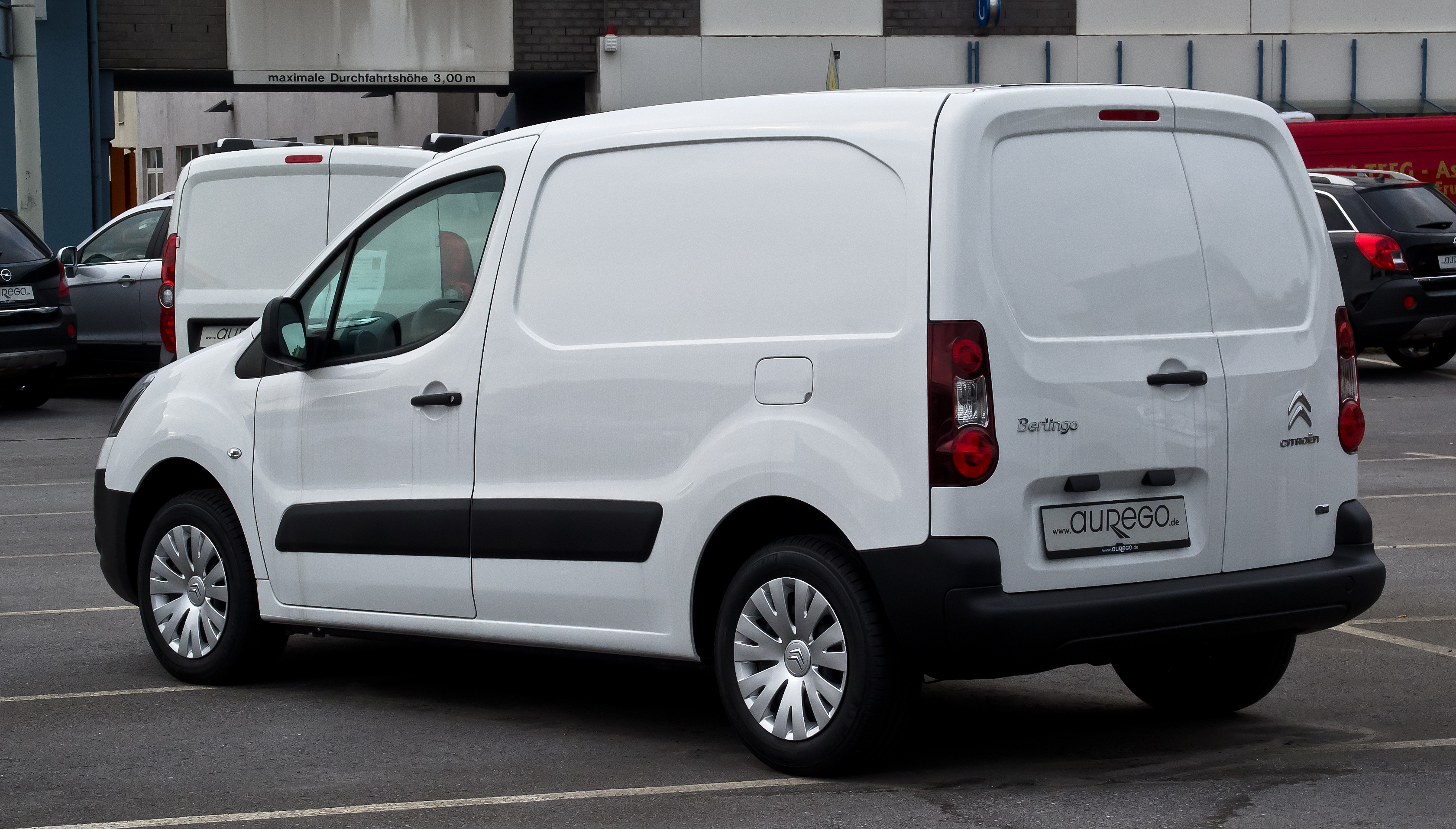 Citroën Berlingo Kastenwagen e-HDi 90 (II, Facelift)